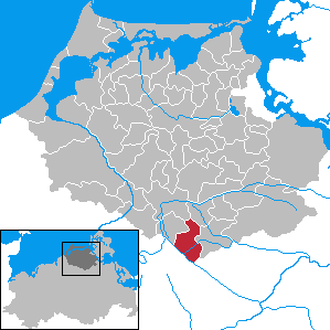 Grammendorf in Mecklenburg-Vorpommern - District Nordvorpommern